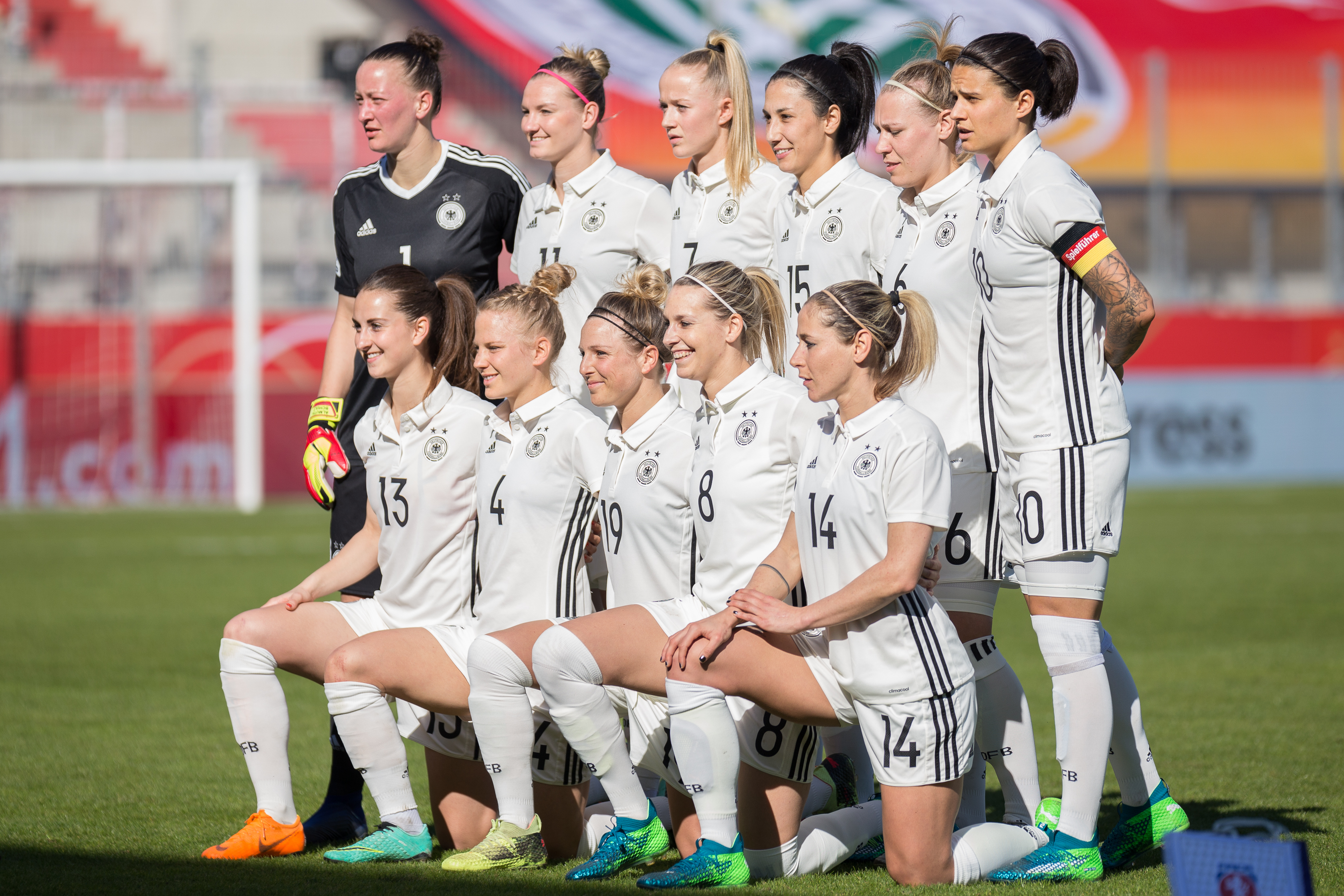 Mannschaftsfoto, Aufstellung, team photo Deutschland (GER)